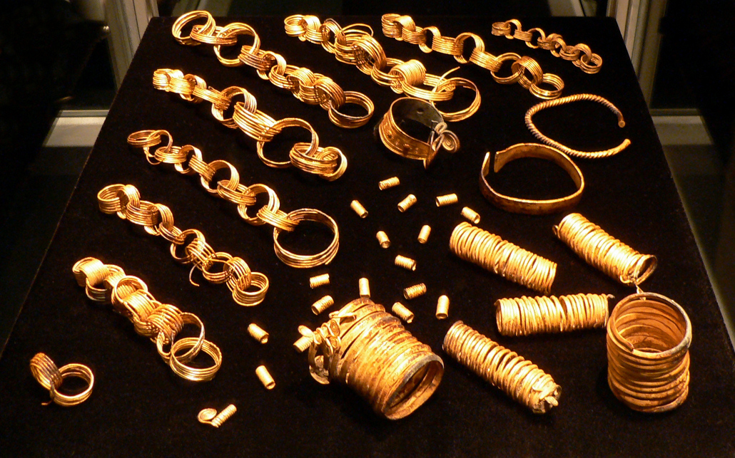 Goldhort von Gessel, präsentiert bei Pressekonferenz, Goldhort von Gessel, fotografiert im Niedersächsischen Landesamt für Denkmalpflege